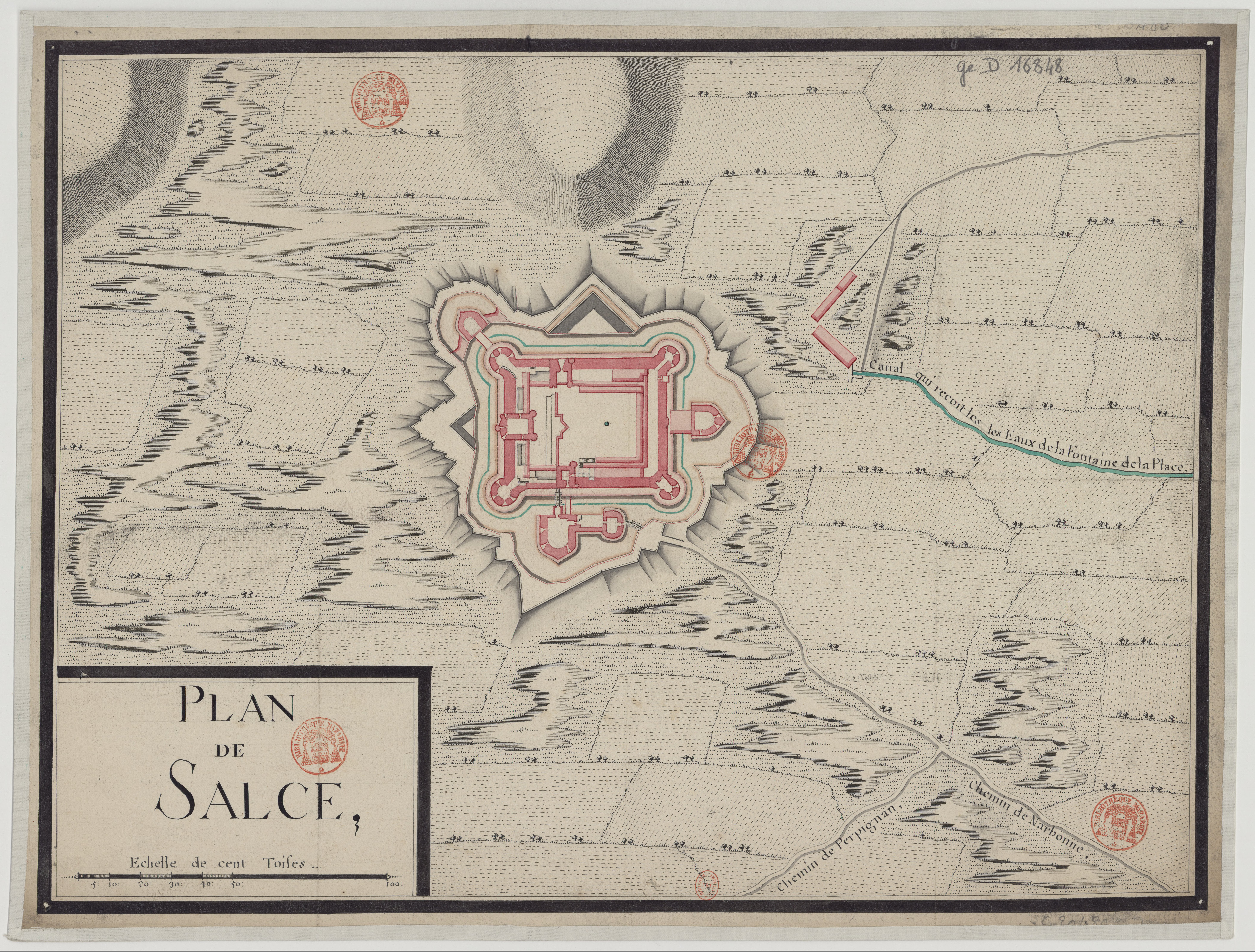 Plan de Salce